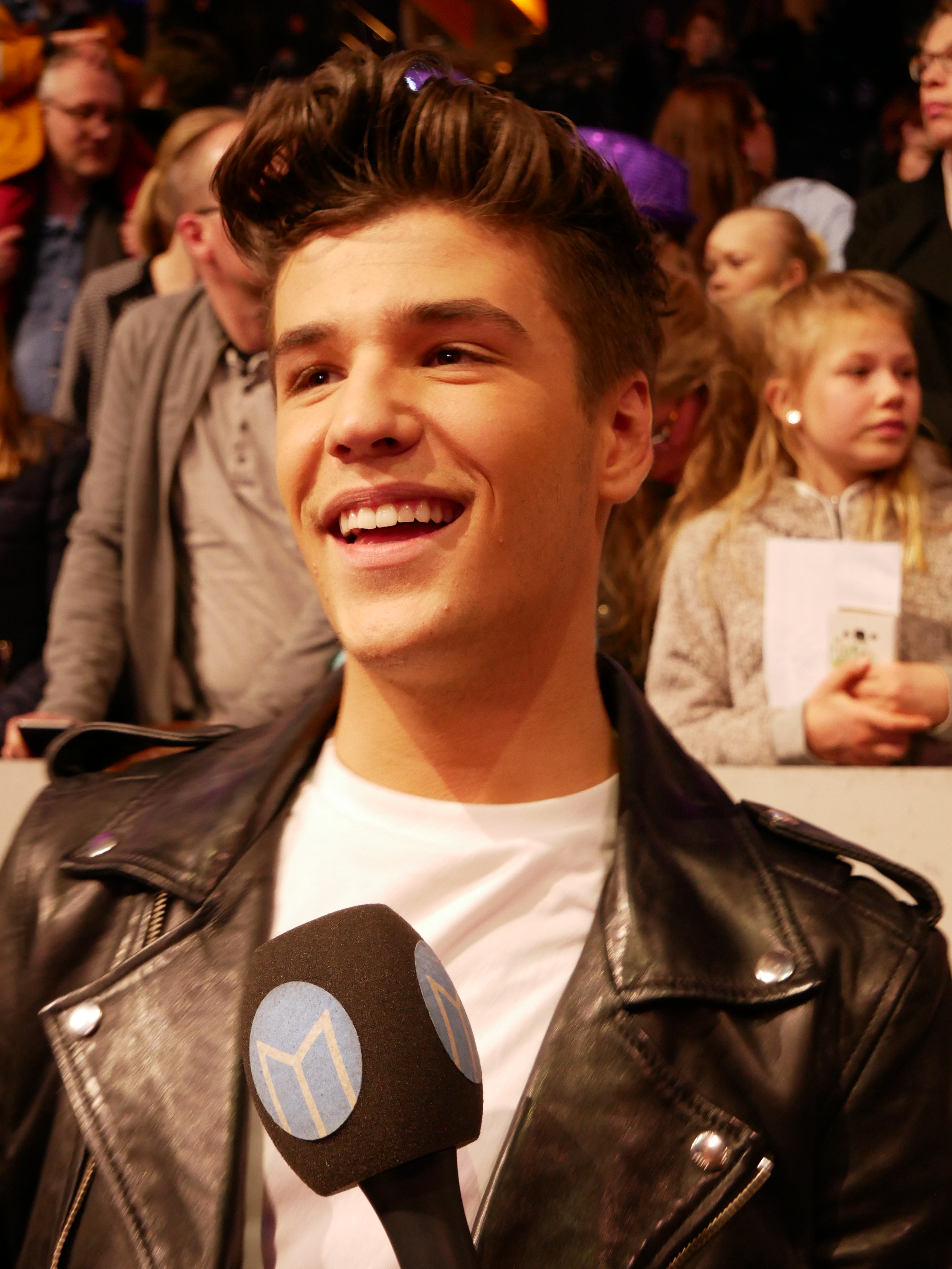 Melodifestivalen 2017, final Anton Hagman